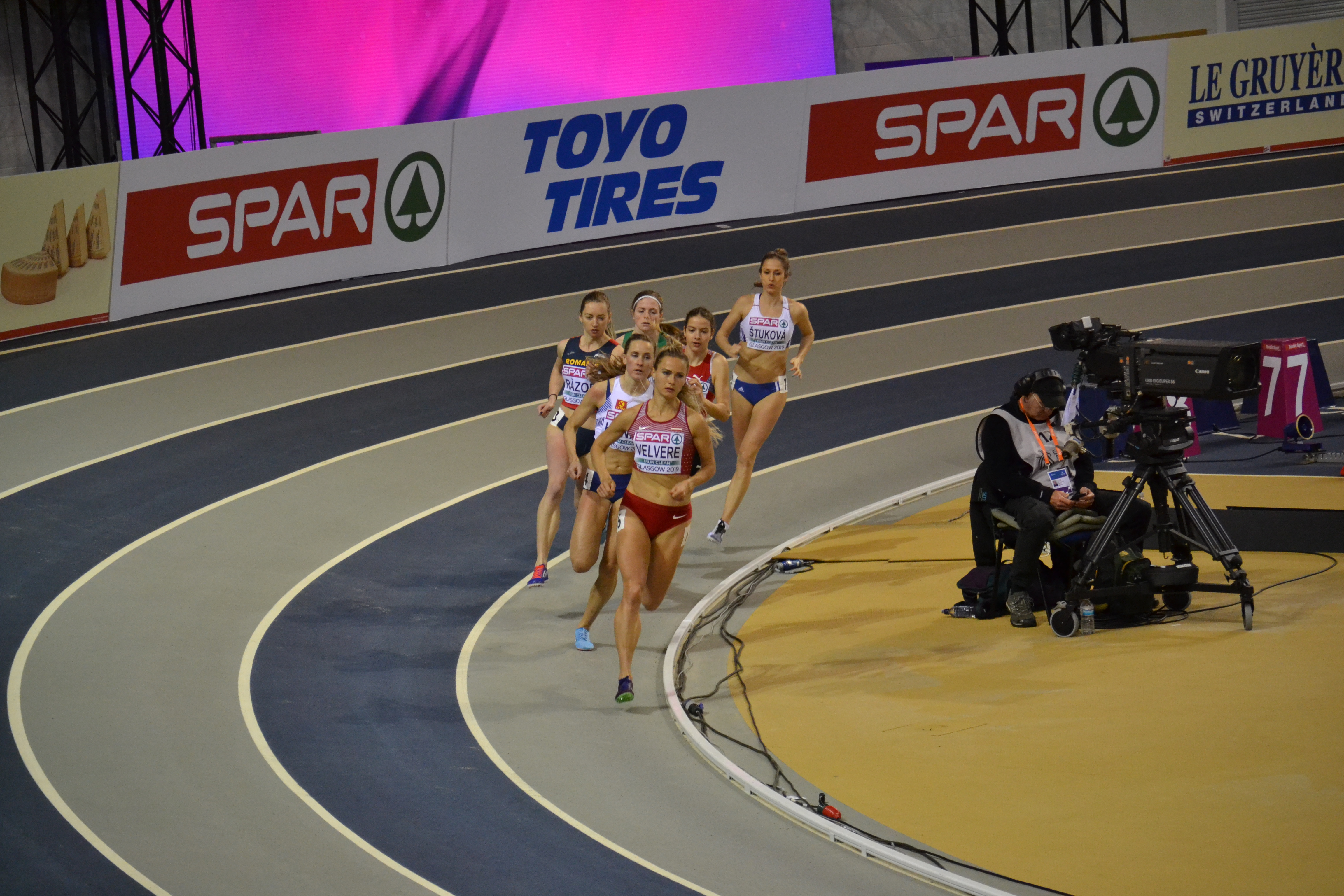 Womens 800m